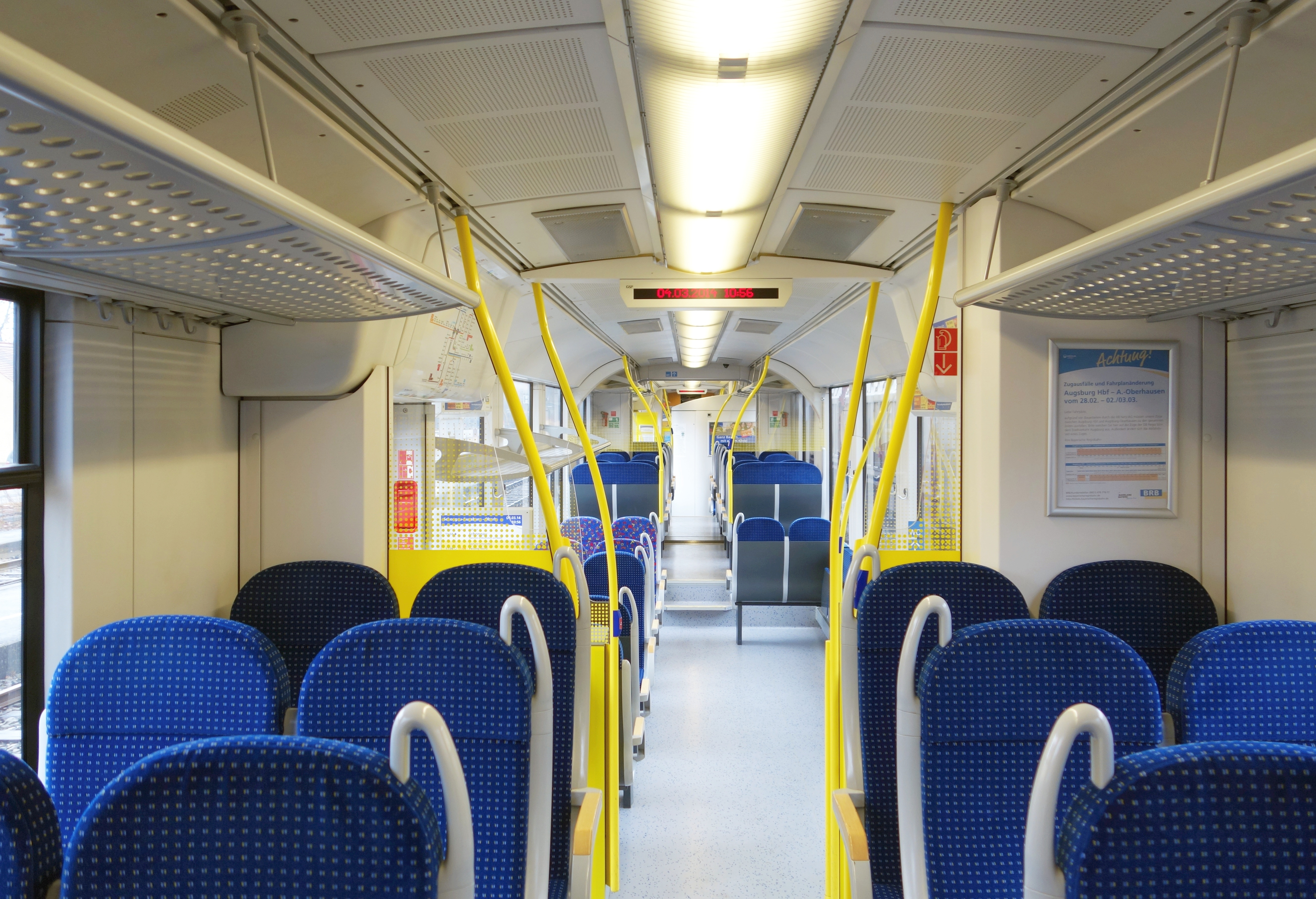 Innenansicht des Triebwagens VT 230 "Aichach" der Bayerischen Regiobahn